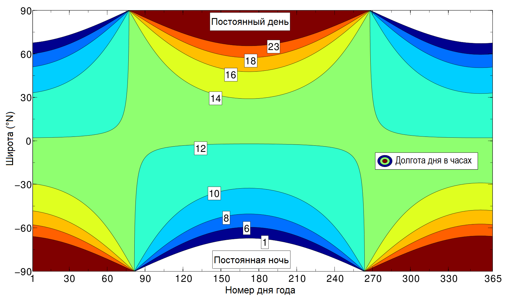 Контурный график долготы дня в часах в зависимости от географической широты (числа градусов северной широты) и номера дня года, с использованием самых точных моделей, описанных в уравнении восхода